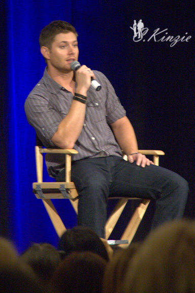 jensen009